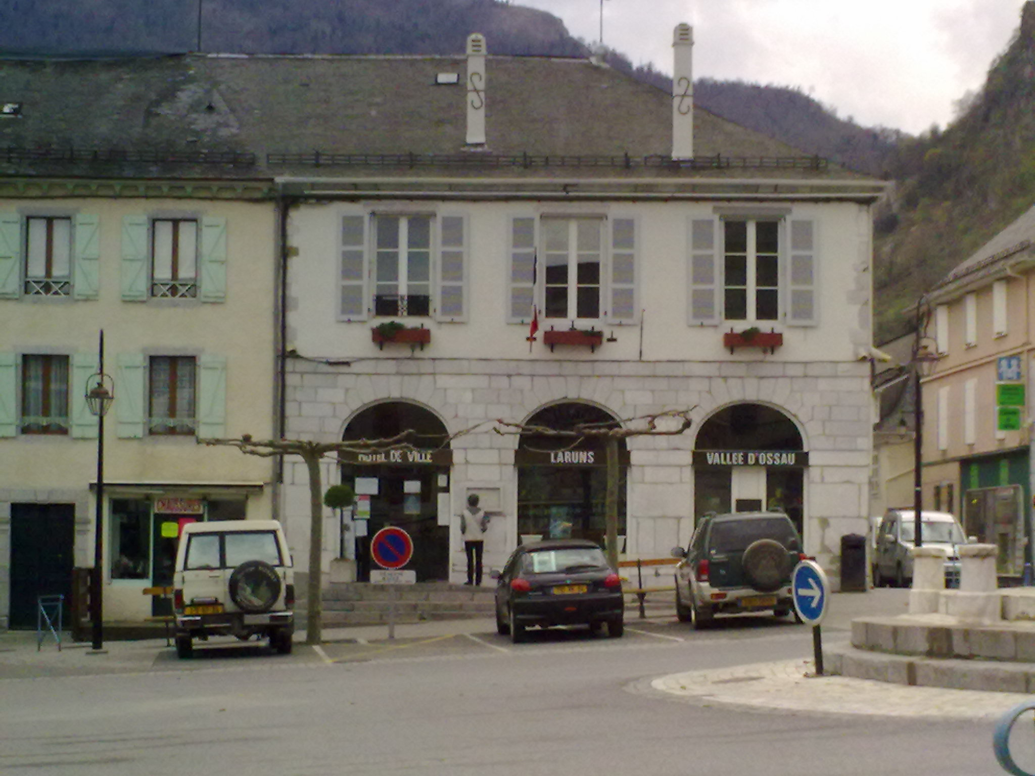 Laruns